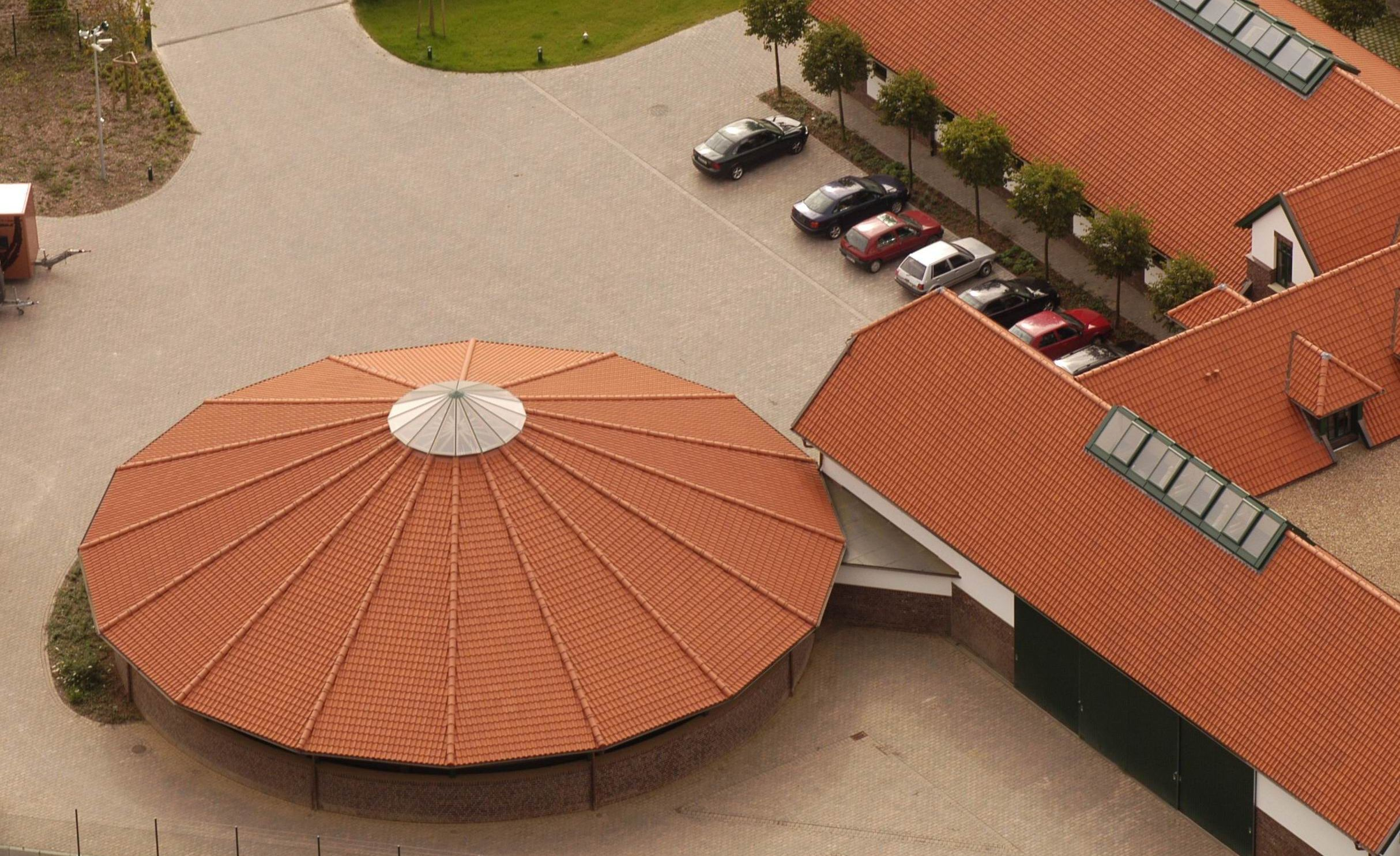 Rundhalle, Longierhalle